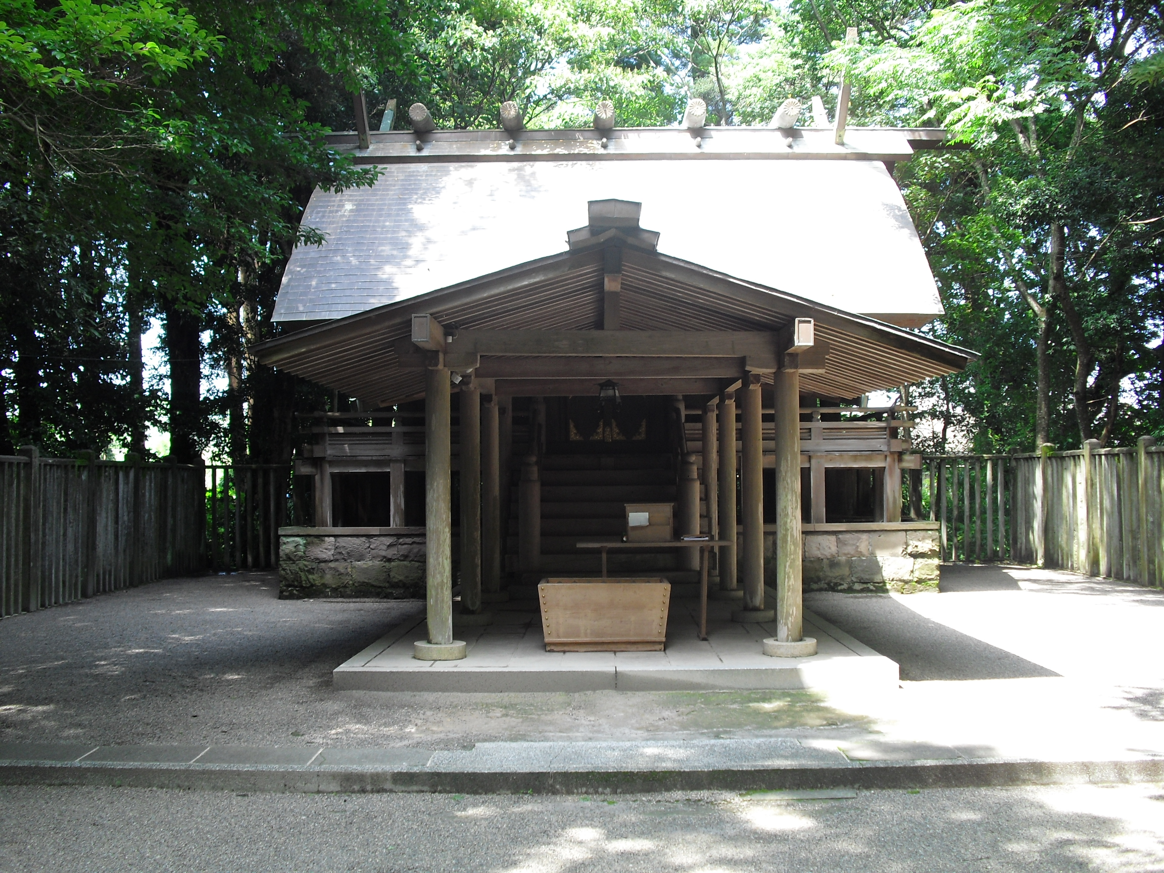 皇宮神社（2012年6月）